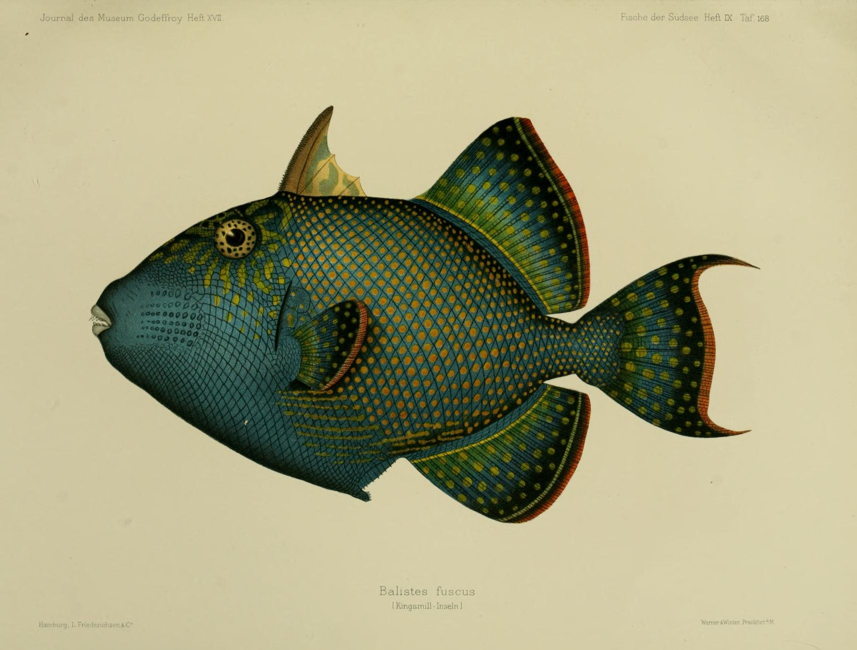 Pseudobalistes fuscus syn. Balistes fuscus